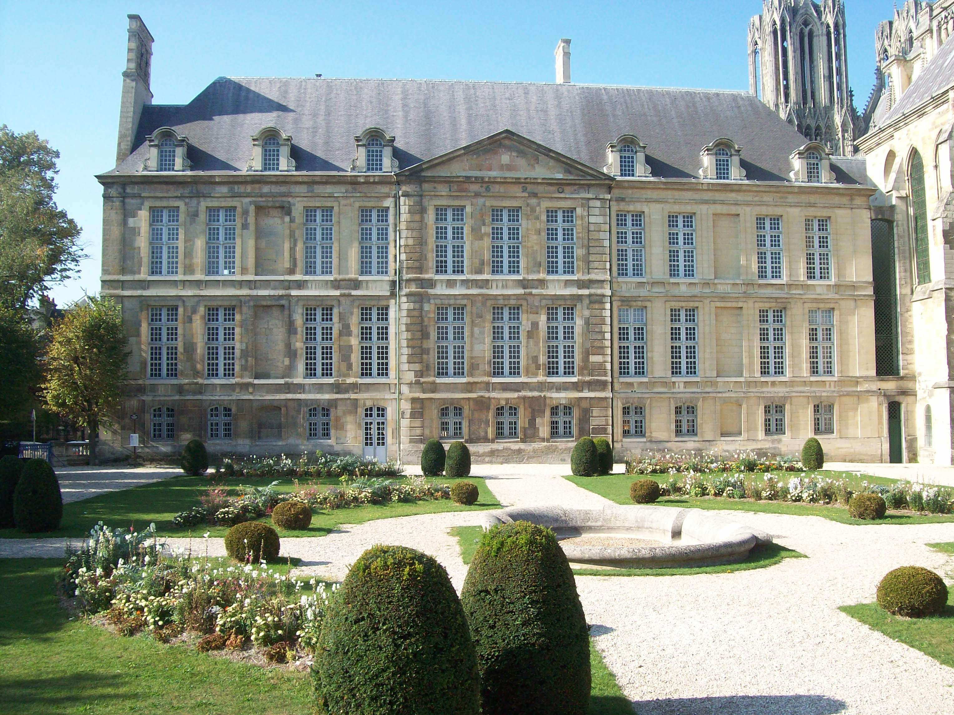 Le Palais du Tau vu des jardins — Reims, Champagne-Ardenne, France